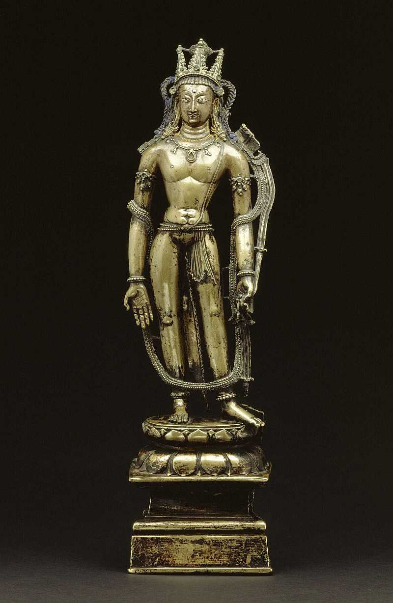 Bodhisattva Padmapani Kashmir 10. Jh., Gelbguß (Messing) mit Silber und Kupfer